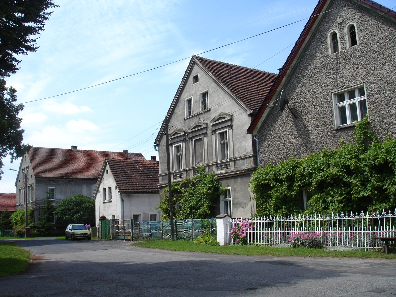 Czeska Wieś (Bohmischdorf), buildings